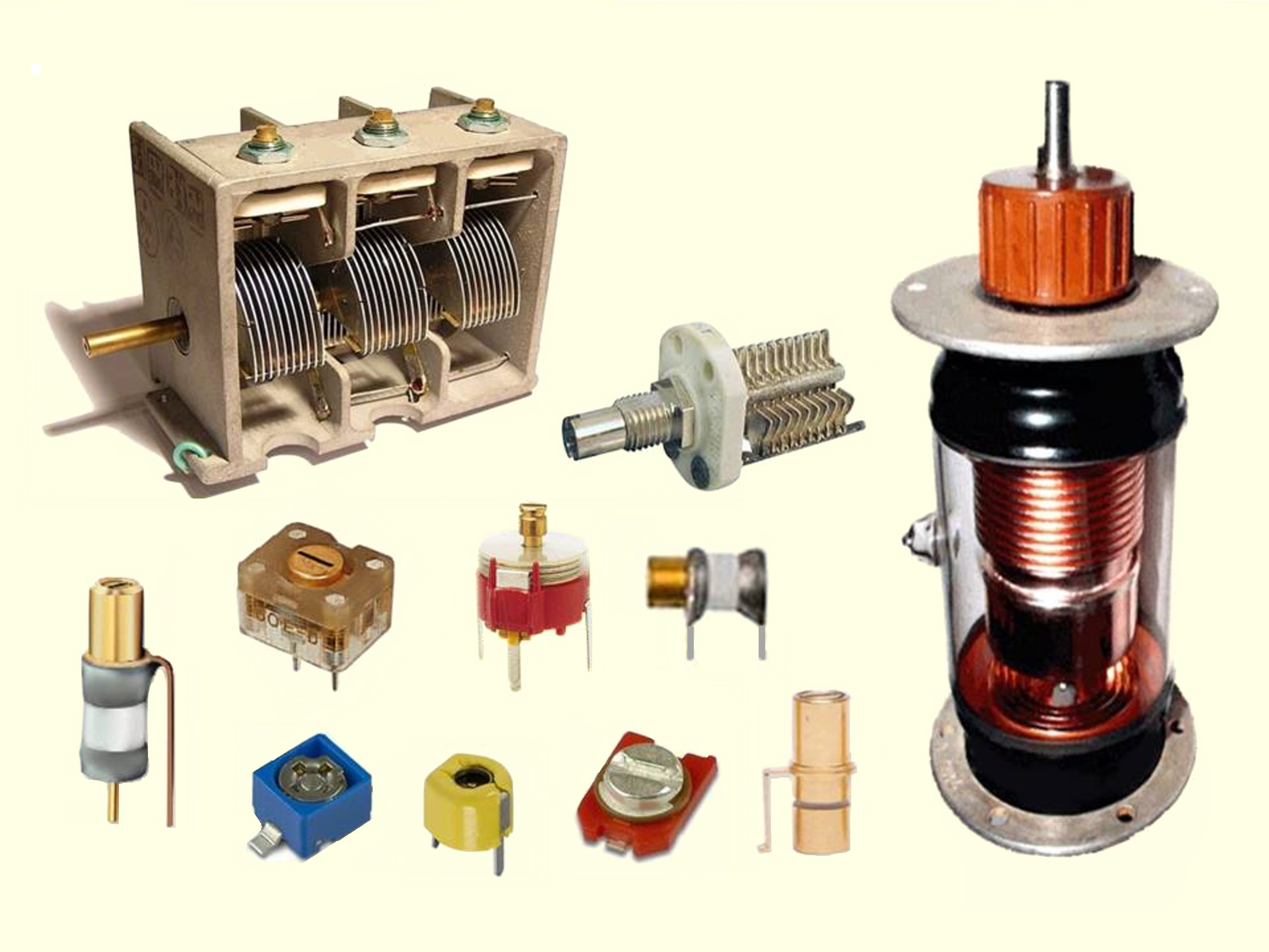 Zusammenstellung mechanisch variabler Kondensatoren; nicht maßstäblich